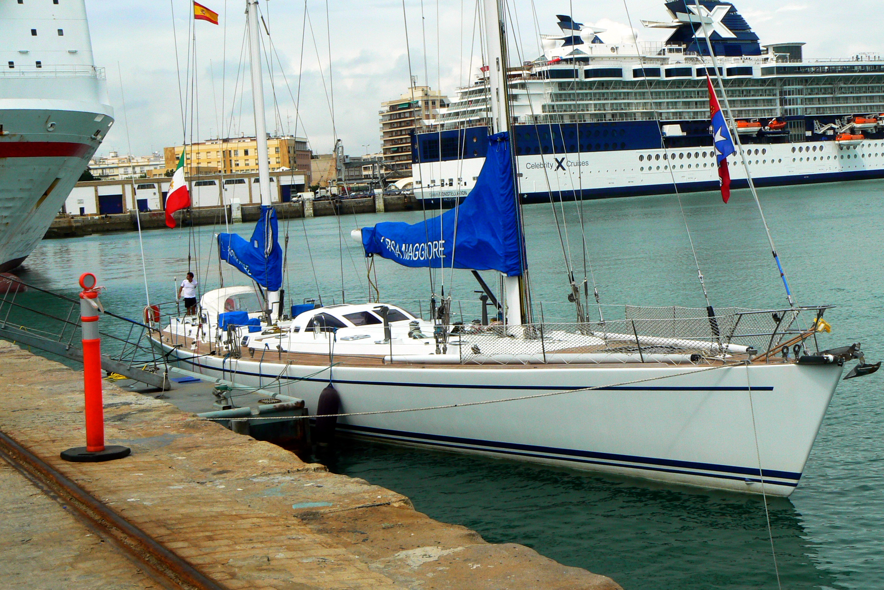 La nave scuola Orsa Maggiore a Cadice